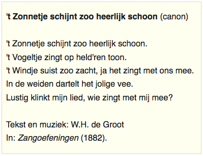 W.H. de Groot, tekst liedje 'Zonnetje schijnt zo heerlijk schoon' (1882). Opgenomen in het liedboek "Kun je nog zingen, zing dan mee" (1906).